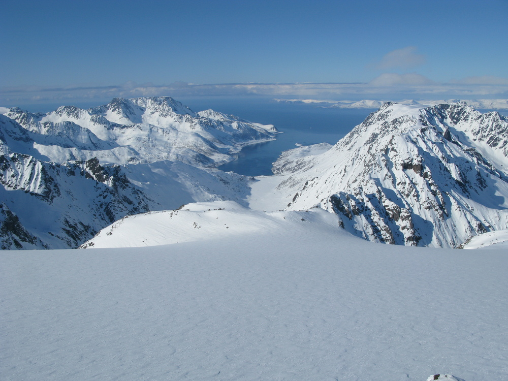 Utsikt fra Loppatind mot Nuvsvåg (nord). Sørøya i bakgrunnen